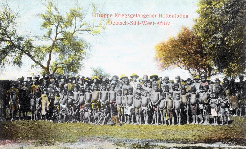 Gruppe Kriegsgefangener Hottentotten Deutsch-Süd-West-Afrika 6011 / Franz Spenker, Hbg. 19. Postkarte. Post card. Carte postale.